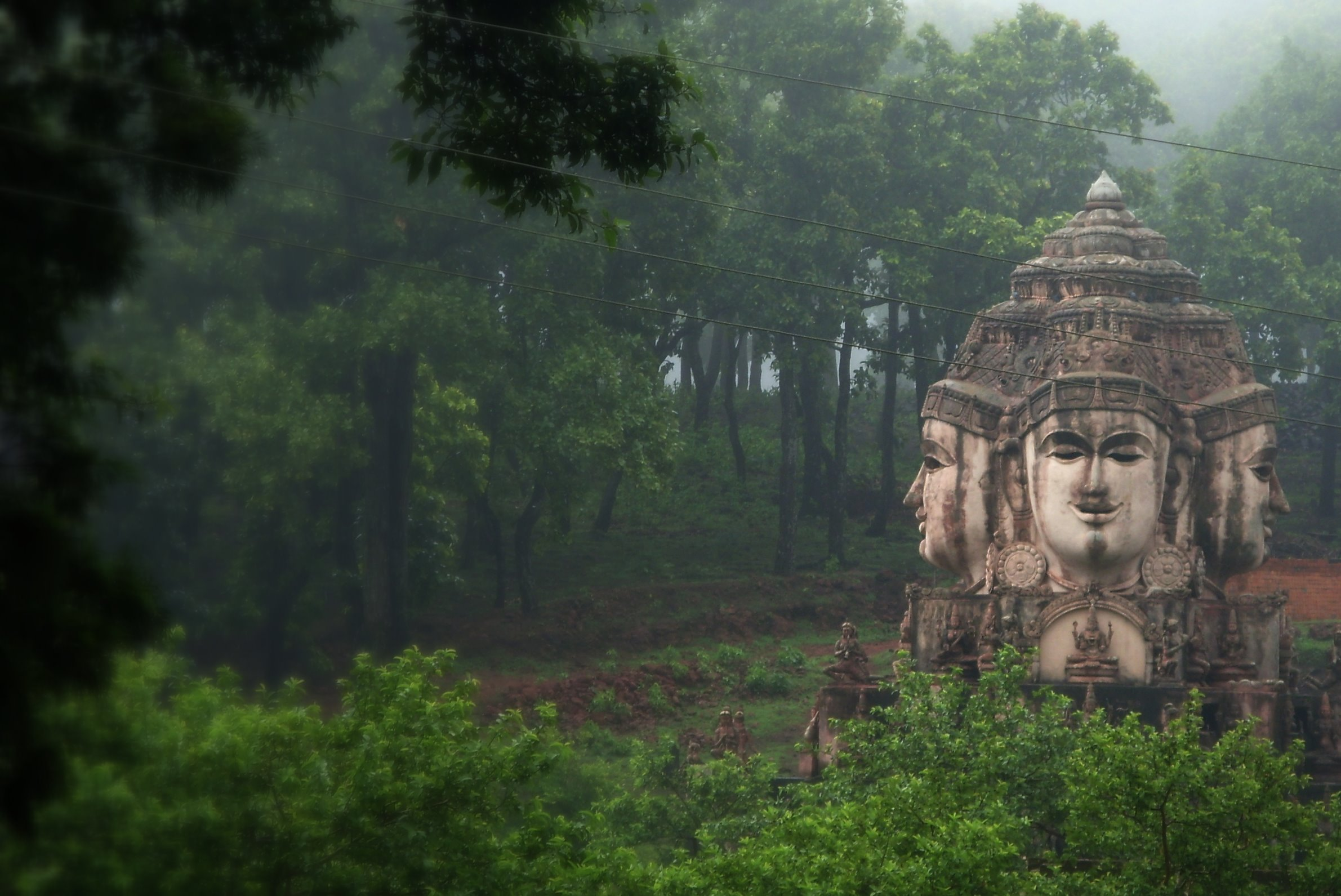 Amarkantak temple, Madhya Pradesh Chhattisgarh border